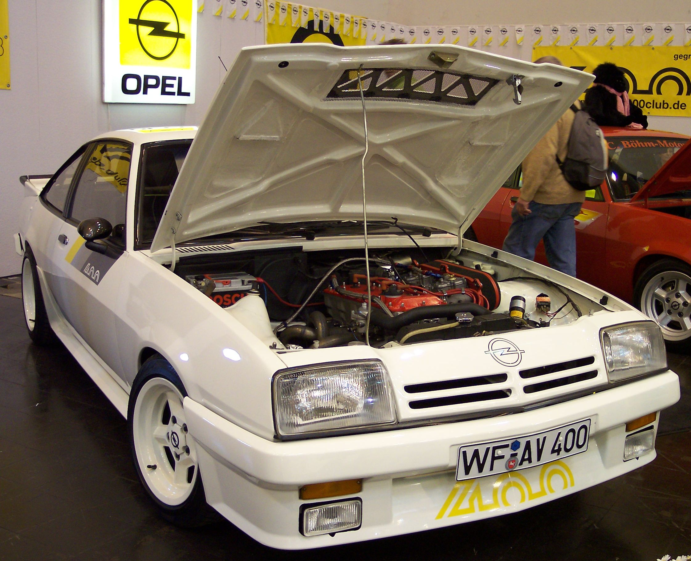 Opel Manta 400i